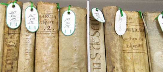 Tejuelo colgante